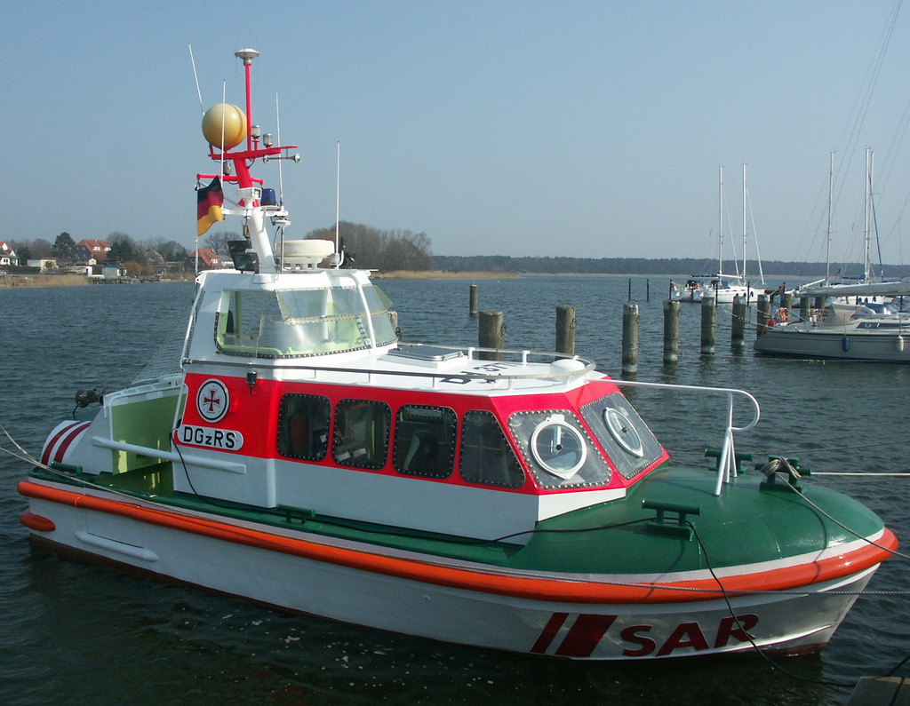 SRB Dornbusch am Anleger in Breege (Rügen)